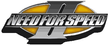 Need for Speed II Logo